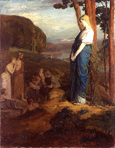 Louis Billotey, Virgile contemple une scène rustique, 1907, Paris, ENSBA